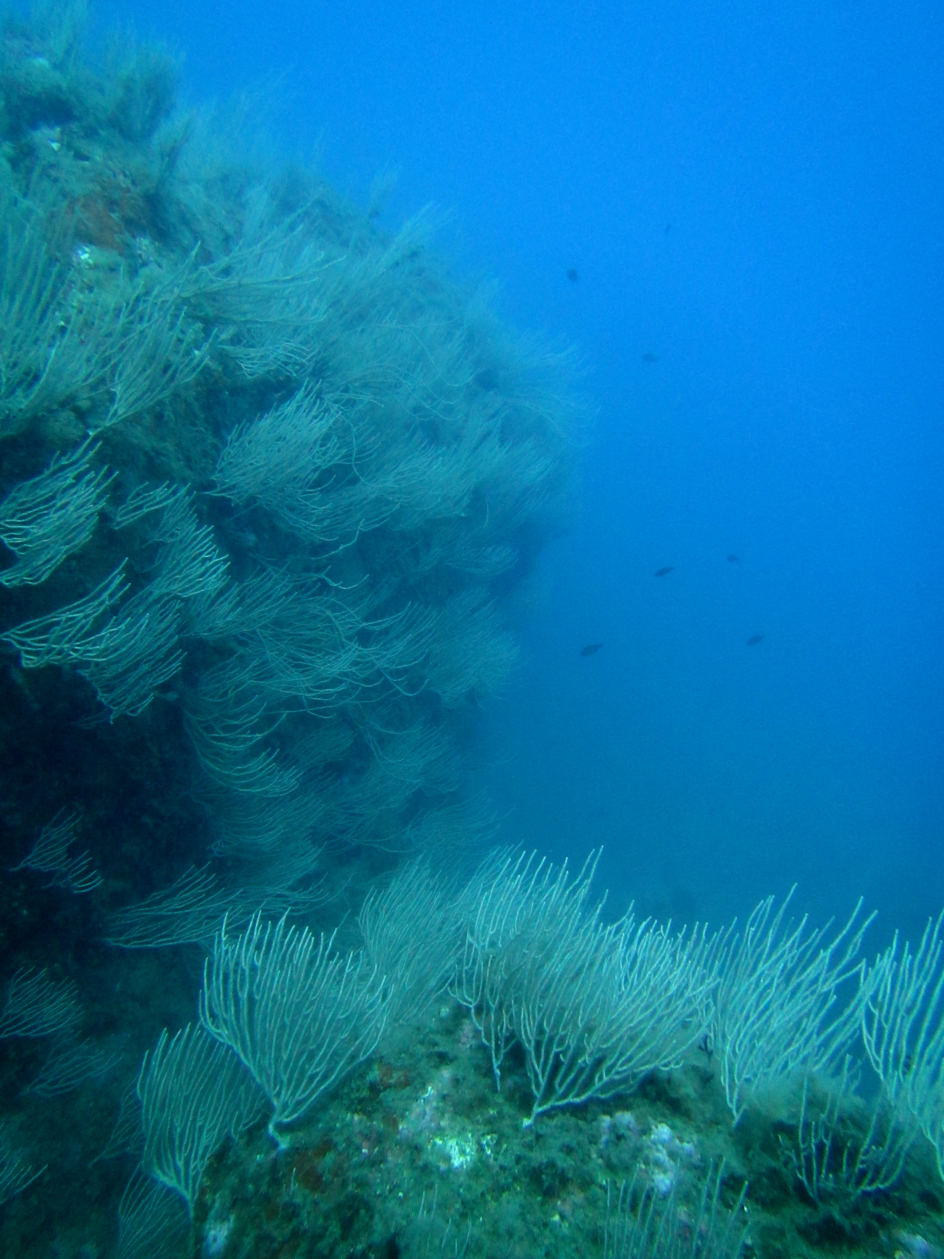 Un paysage sous-marin de gorgones blanches (Eunicella singularis) observé dans la Réserve Marine de Banyuls-sur-mer (Méditerranée).